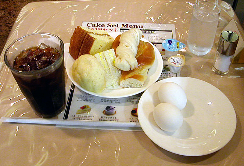 撮影者：小太刀 名古屋の喫茶店のモーニングの一例です。この喫茶店は名古屋駅地下のベルヘラルドという喫茶店です。アイスコーヒーの「おまけ」としてサンドイッチなどのパン類とゆで卵が写っています。2007年5月1日現在420円で他の喫茶店より数十円高いようですがしかしこの喫茶店ではこれらの「おまけ」が食べ放題になっています。